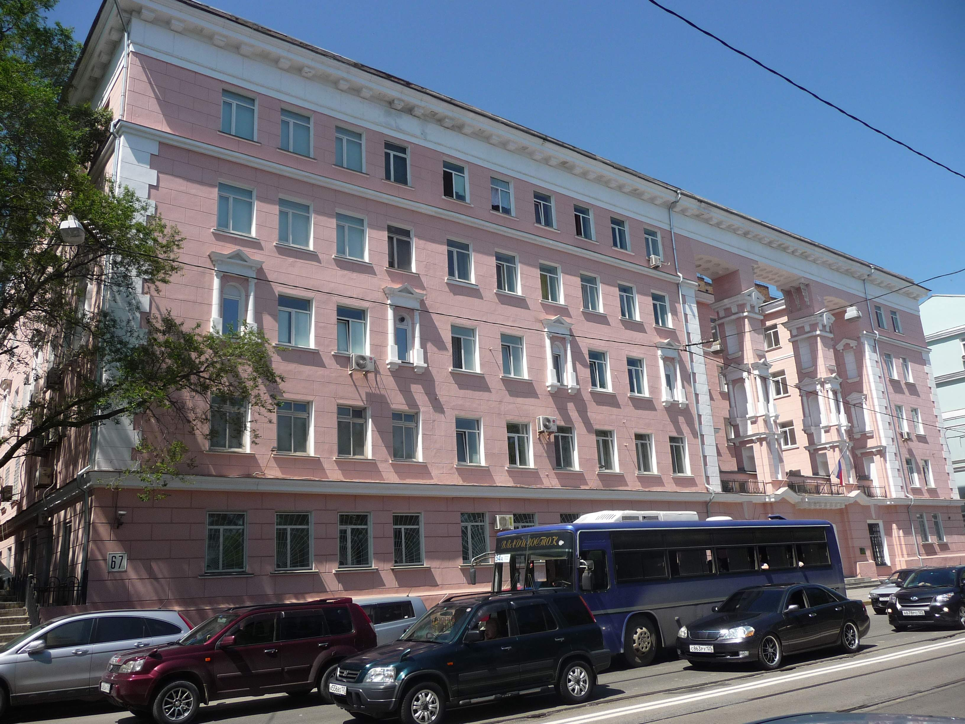 Владивосток, ул. Светланская, 67, здание штаба Тихоокеанского пограничного округа, 2012-07-05